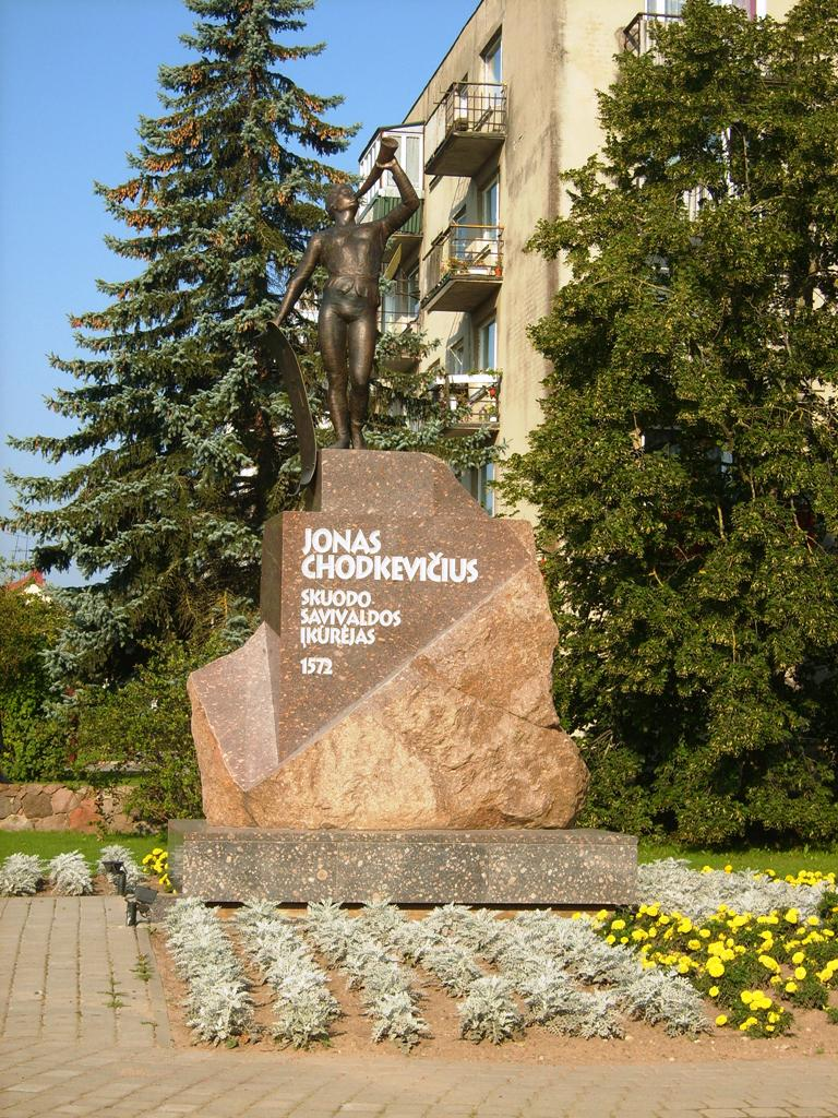 Pamiklas Skuodo rajono savivaldybės įkūrėjui J. Chodkevičiui